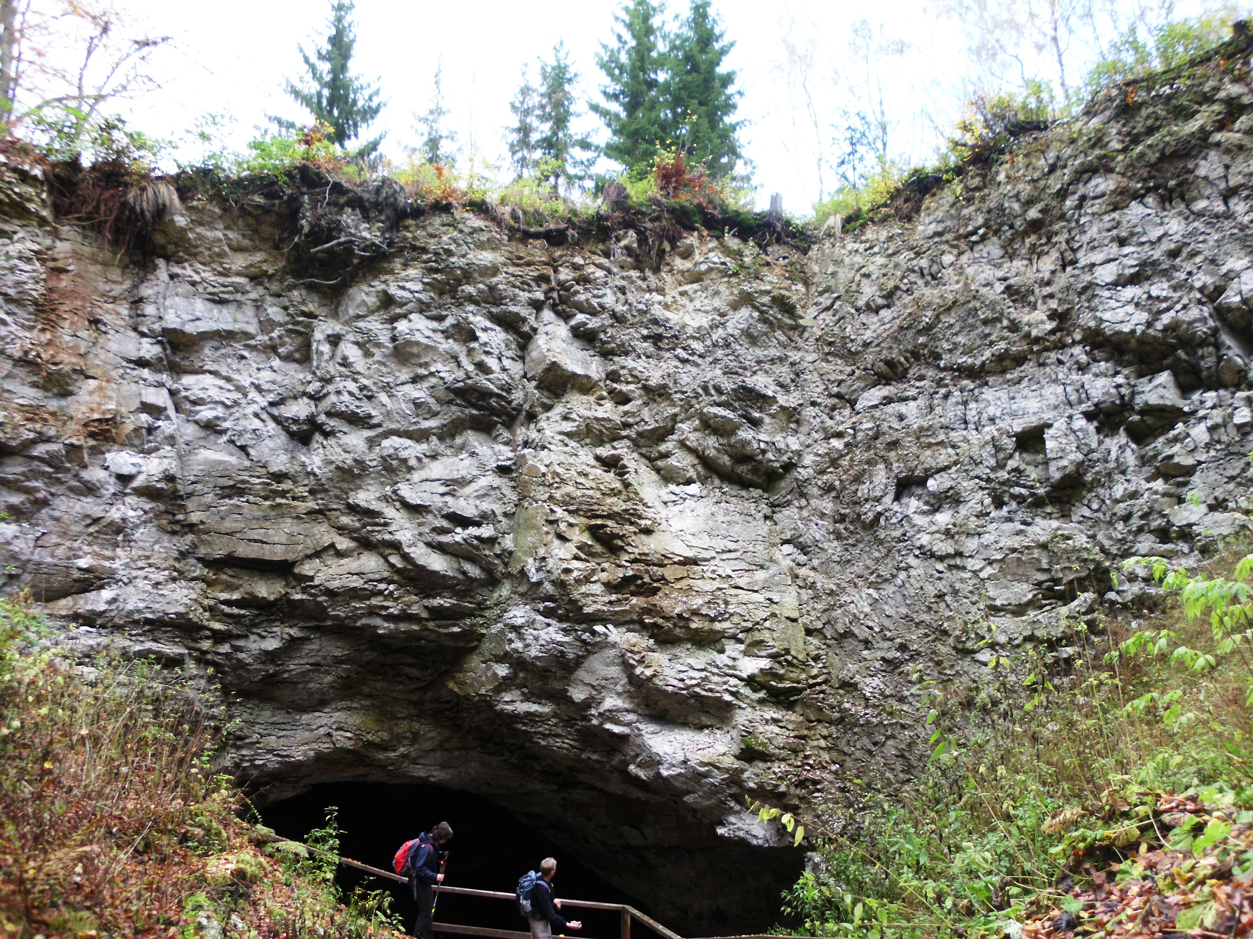 Hölle Kelle bei Appenrode, Stadt Ellrich